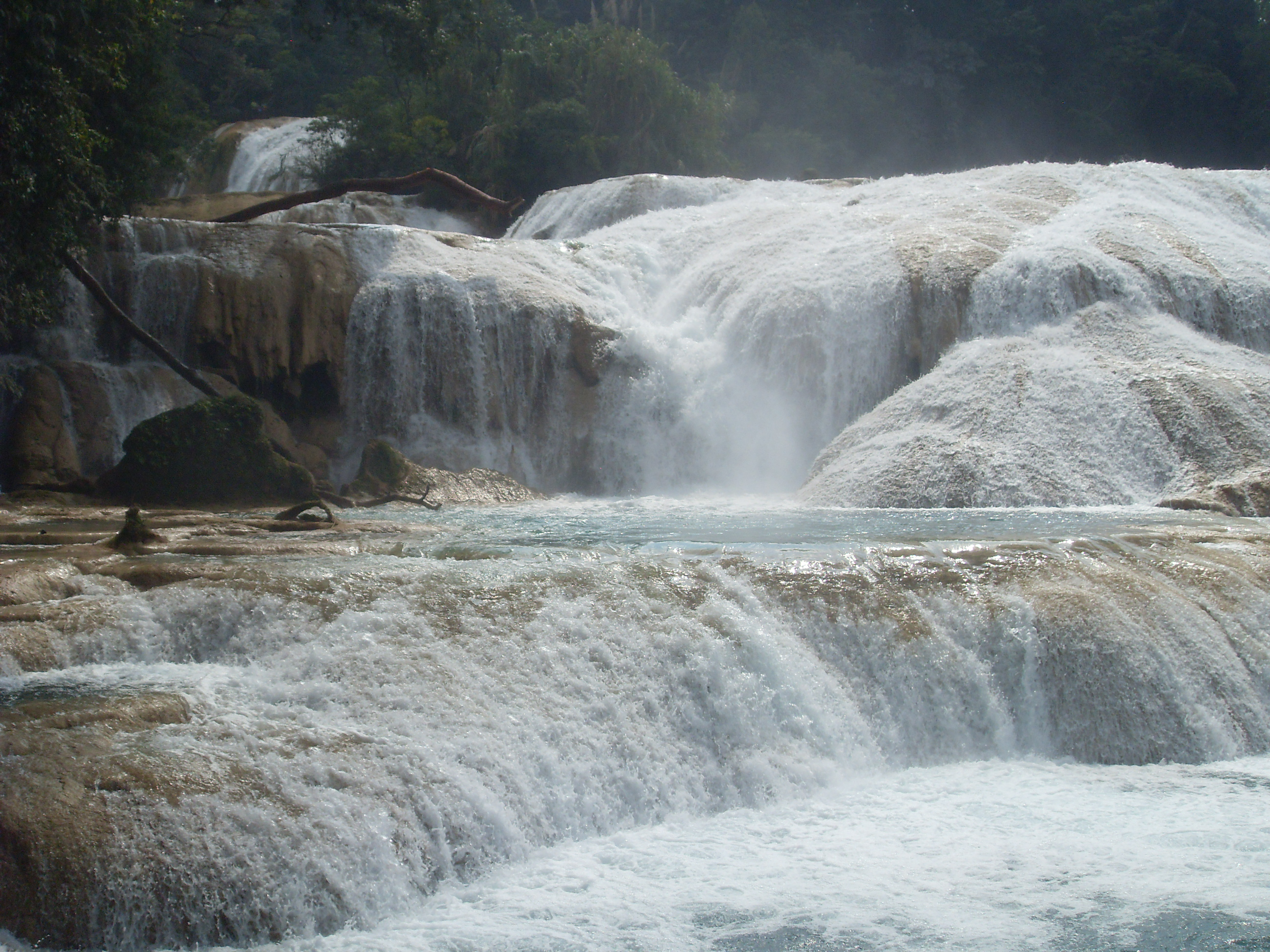 Wodospad Agua azul w stanie Chiapas w Meksyku